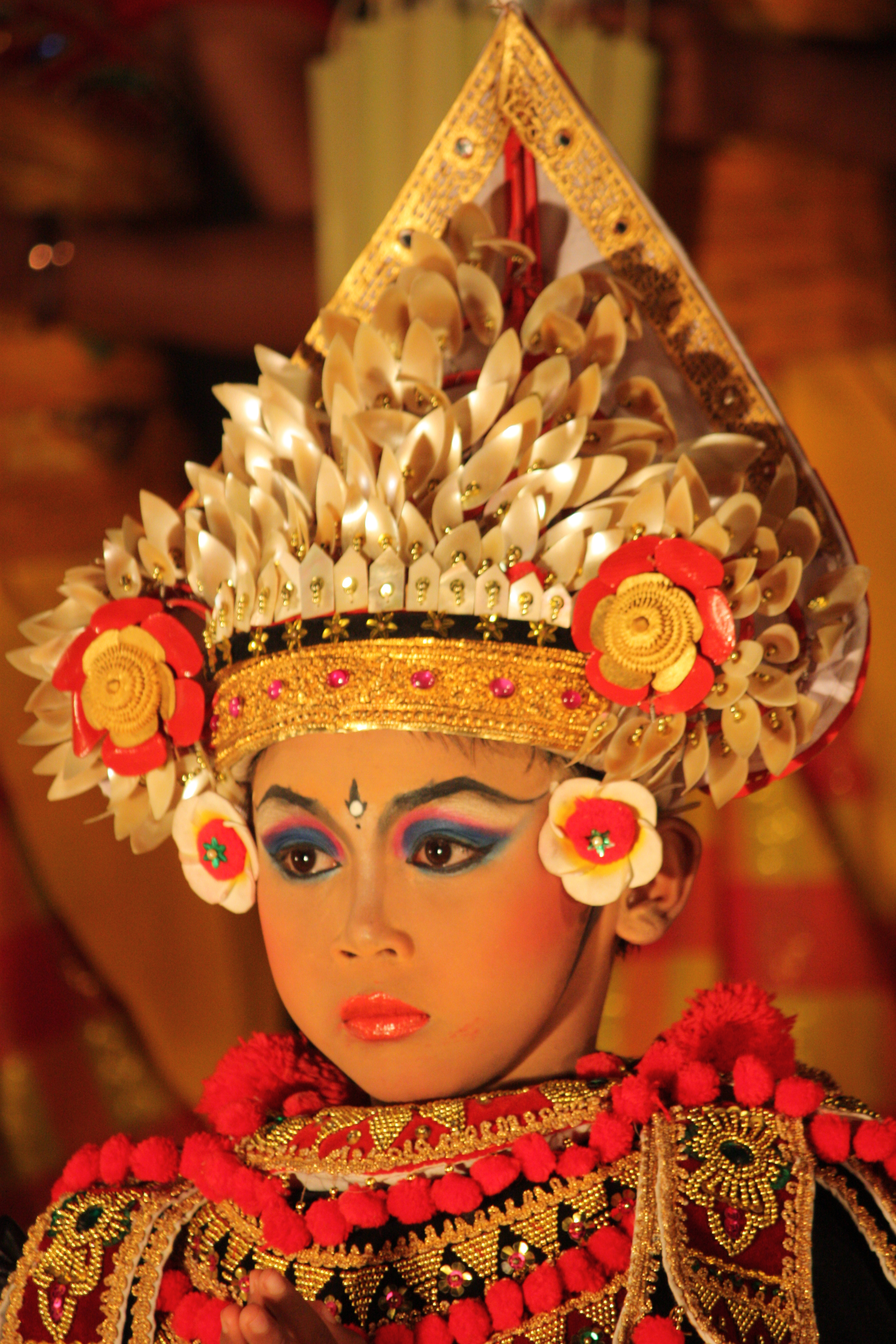 Ubud, Baris dancer